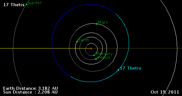 Orbit diagram of 17 Thetis